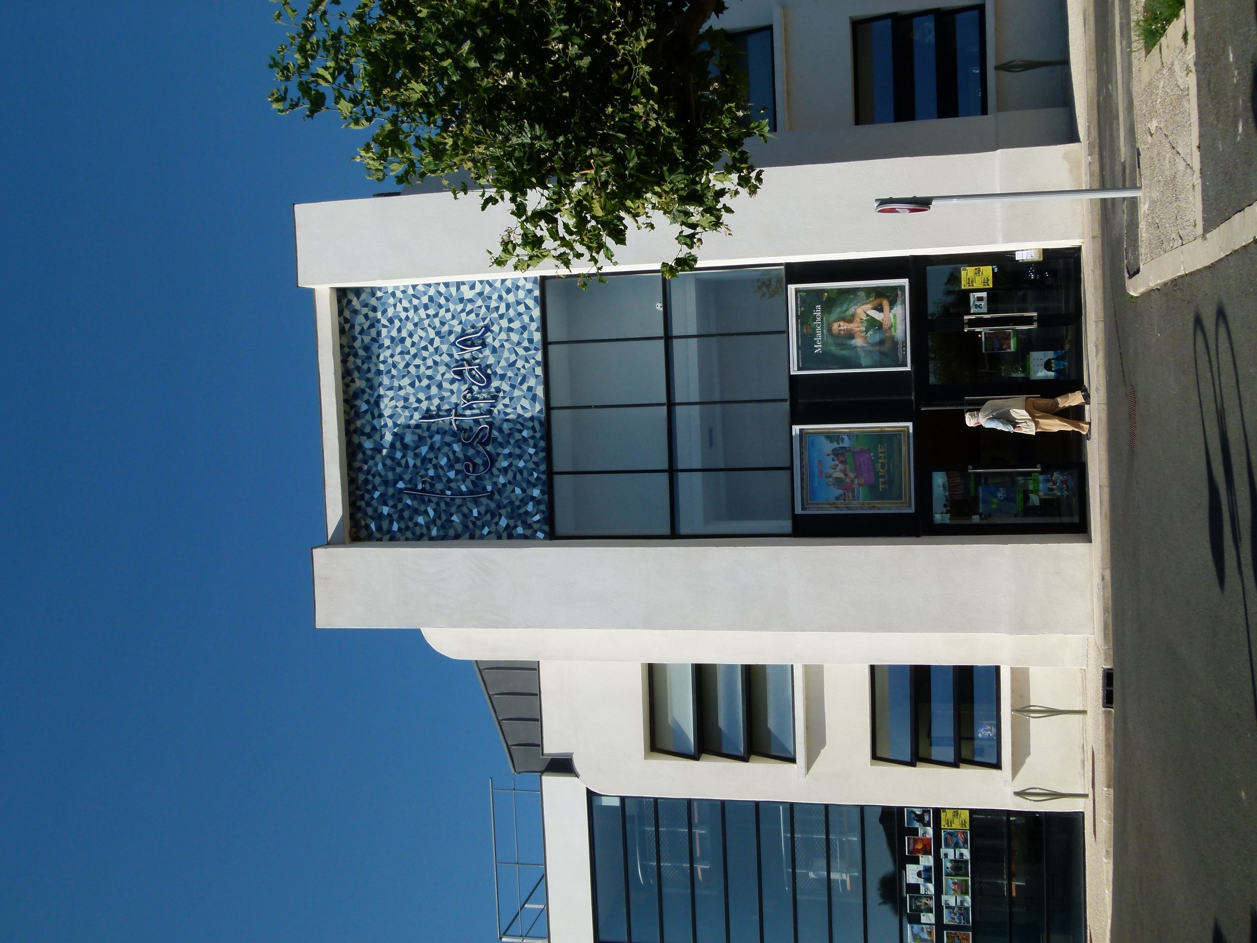 Le cinéma de Marennes (17) est une création récente.